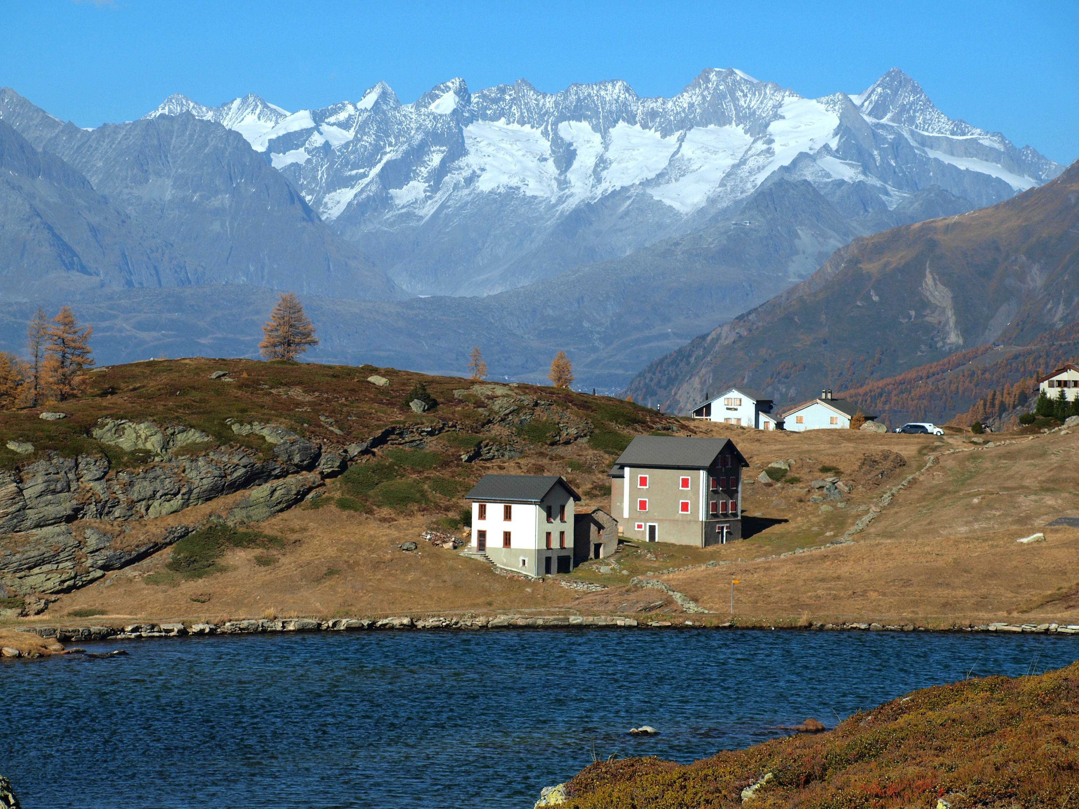 Rotelsee im Sommer